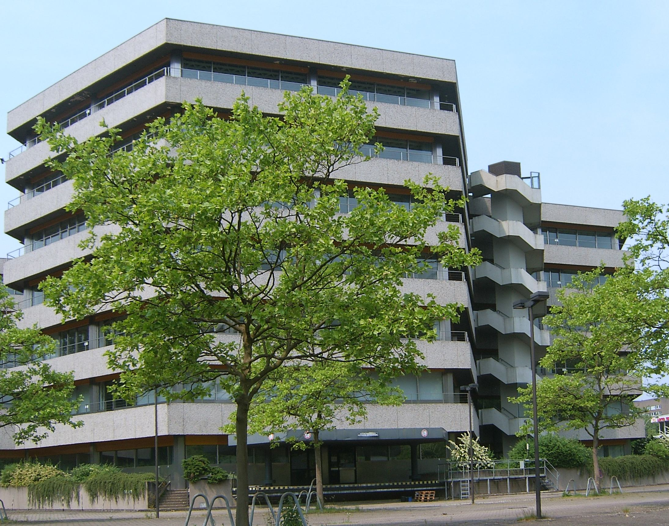 Ehemaliges BP-Gebäude in der City-Nord in Winterhude.